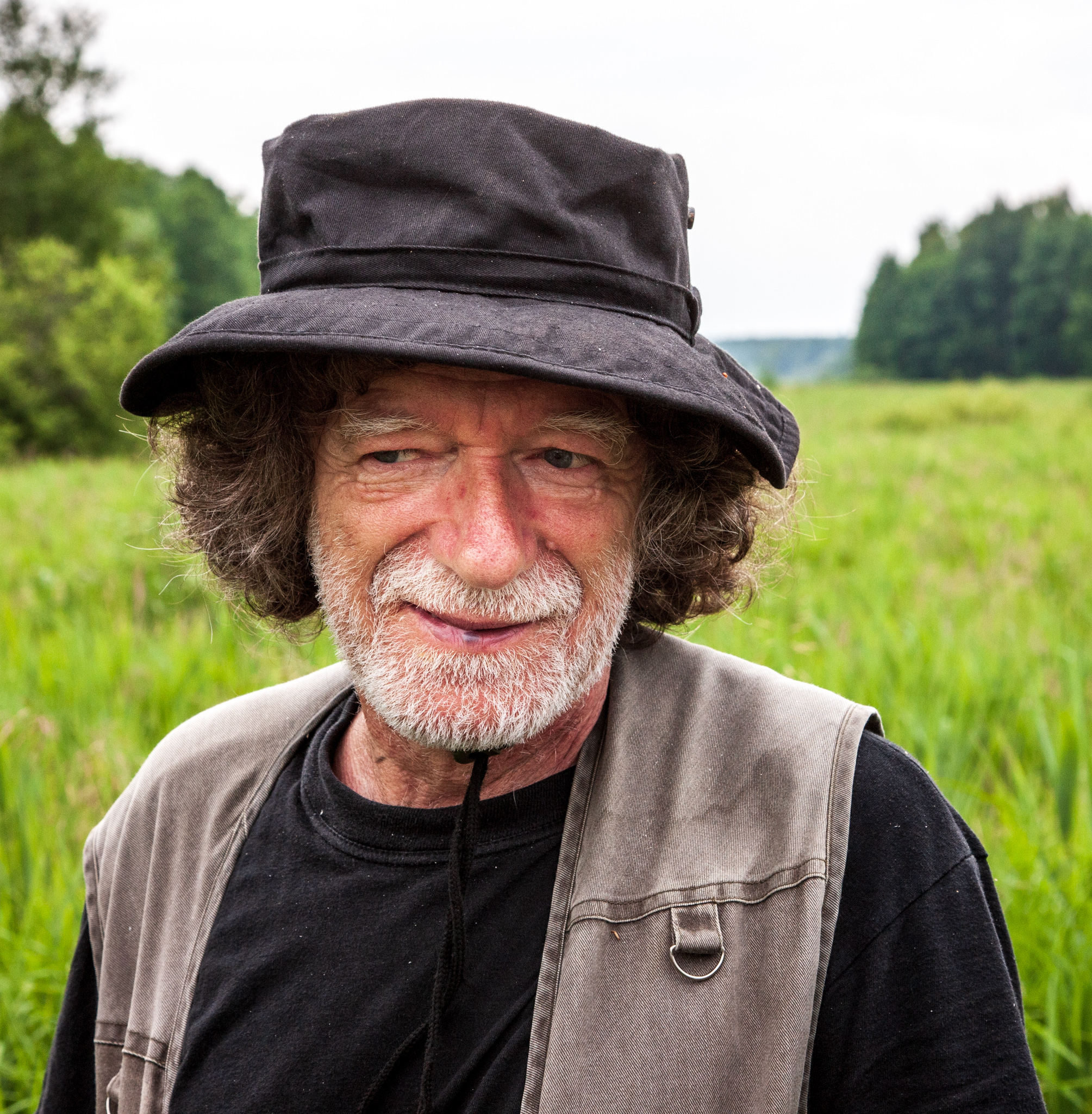 Janusz Korbel, průvodce Bělověží, kousek od vstupu do Bělověžského pralesa